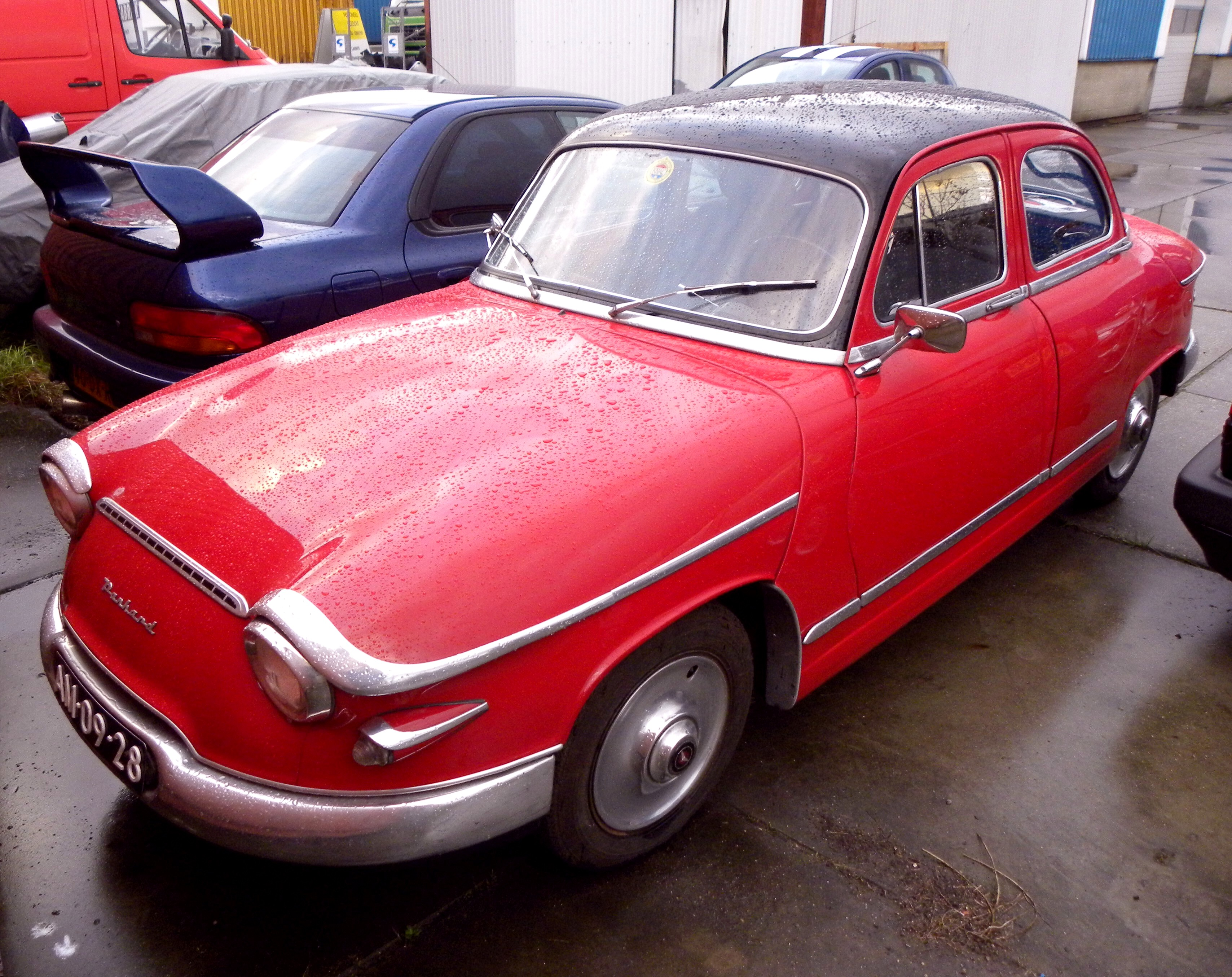 Panhard PL 17 L 4